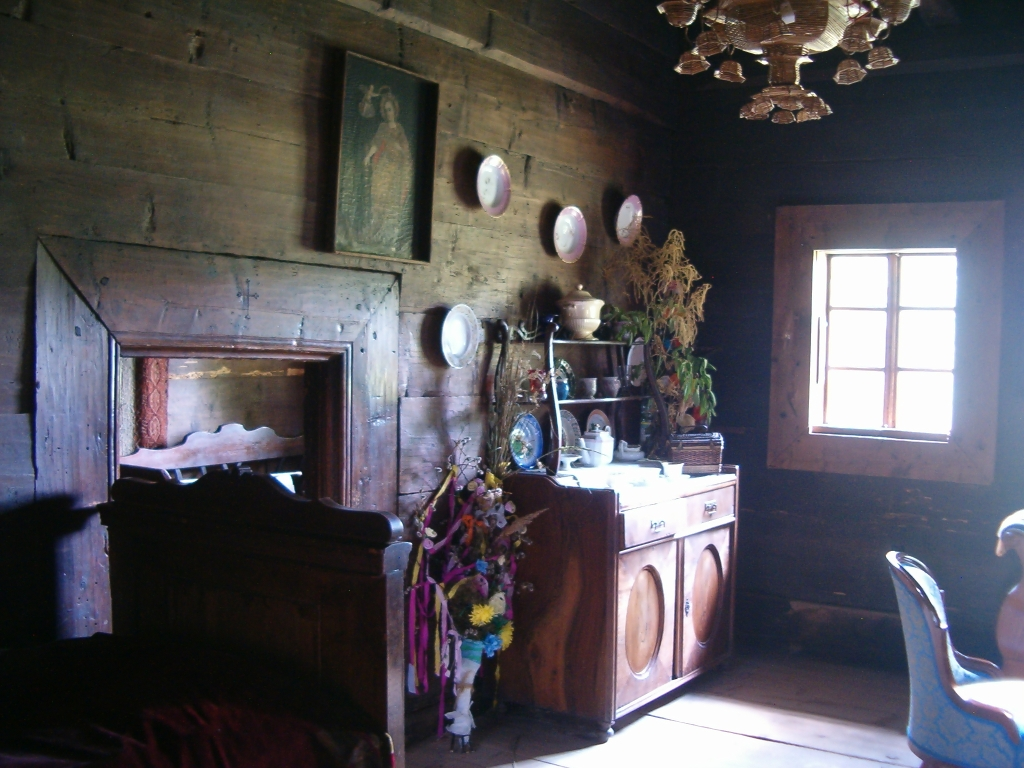 Orawski Park Etnograficzny w Zubrzycy Górnej. Wnętrze Dworu Moniaków.